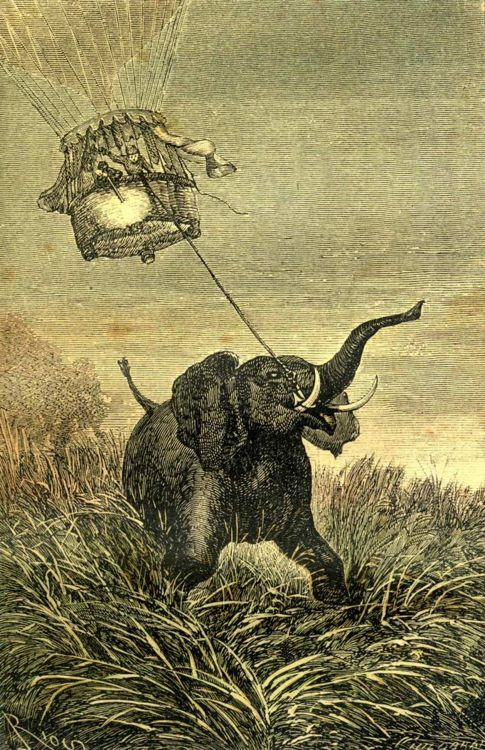 An illustration from Jules Verne's nowel "Five Weeks in a Balloon" drawn by Édouard Riou.